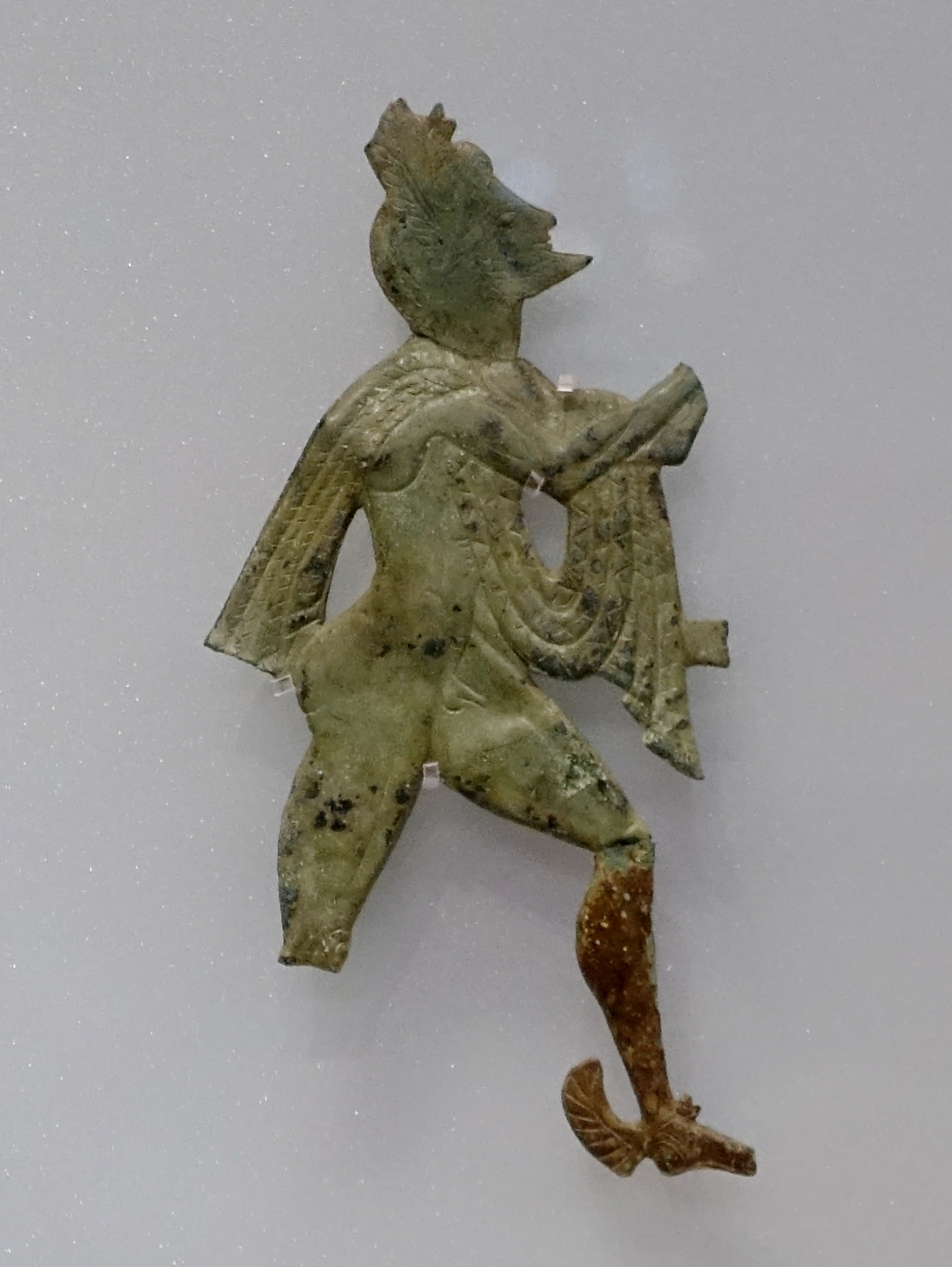 Durch Hämmern und Gravieren verzierte ausgeschnittene Bronzeplatte, Darstellung des Gottes Hermes (Archaisch-Klassische Zeit, 7. bis Mitte des 5. Jahrhunderts v. Chr.), gefunden im Heiligtum des Hermes und der Aphrodite bei Symi, Archäologisches Museum von Iraklio, Kreta, Griechenland